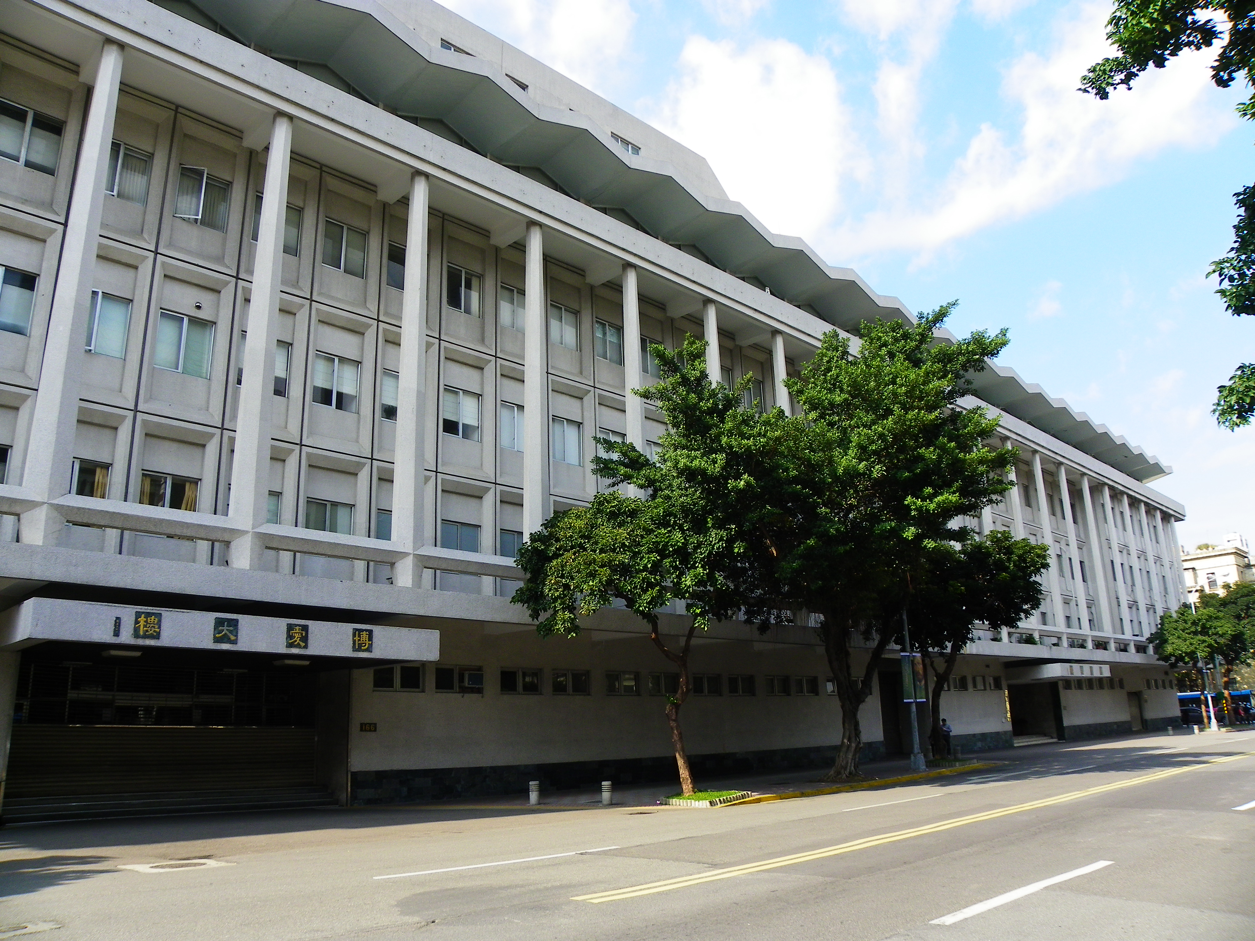 博愛大楼（中華民国国防部）、所在地：10048 台北市中正区博愛路164、166号。 Bân-lâm-gú: Phok-ài Tuā-lâu (Tiong-huâ Bîn-kok Kok-hông-pōo), sóo-tsāi-tē:10048 Tâi-pak-tshī Tiong-tsìng-khu Phok-ài-lōo 164, 166-hō.